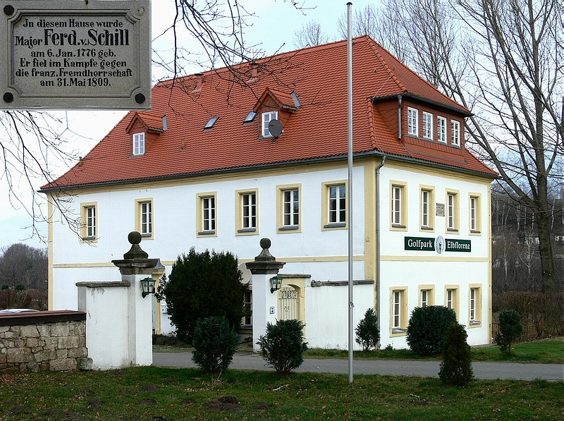 Rittergut Wilmsdorf bei Possendorf (Sachsen), Geburtshaus Ferdinands von Schill mit Gedenktafel